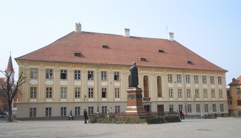 Collège von Brukenthal à Sibiu, sur la place Huet. Statue de l'évêque Georg Daniel Teutsch. A gauche,clocher de l'église réformée.